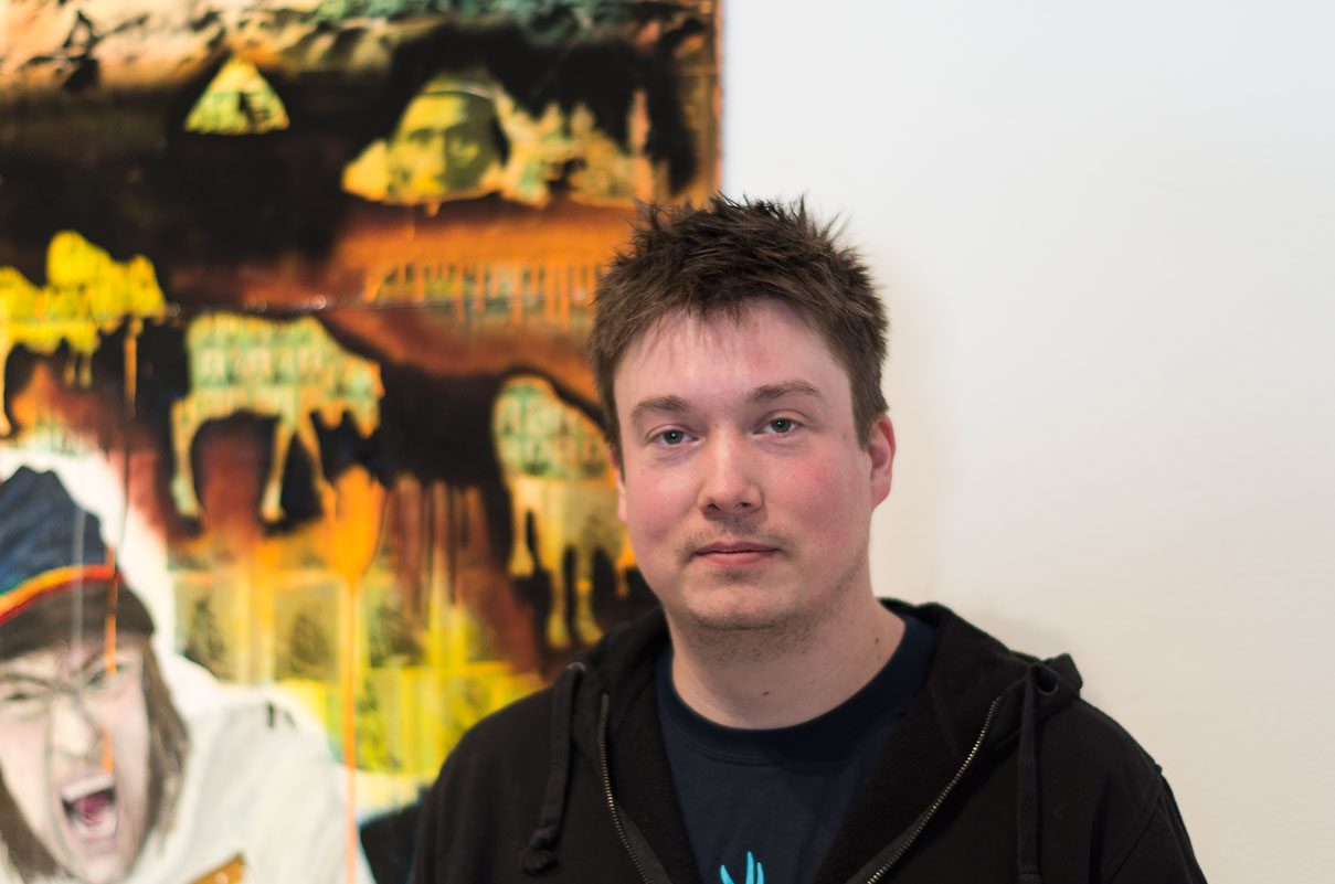 Anders Sunna, samisk konstnär fotograferad vid vernissage på Västerbottens Museum, 160228.